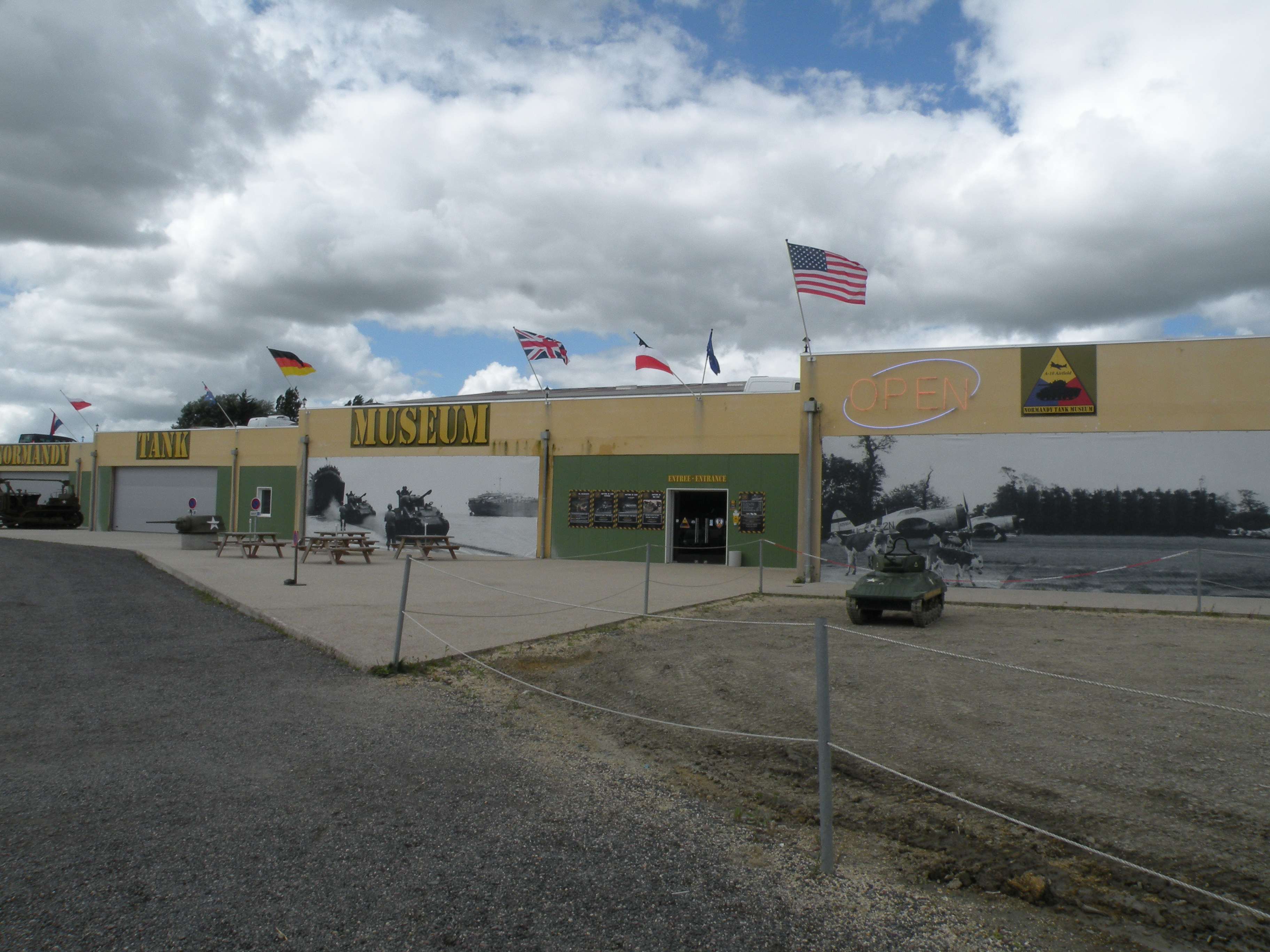 Musée du tank de Carentan